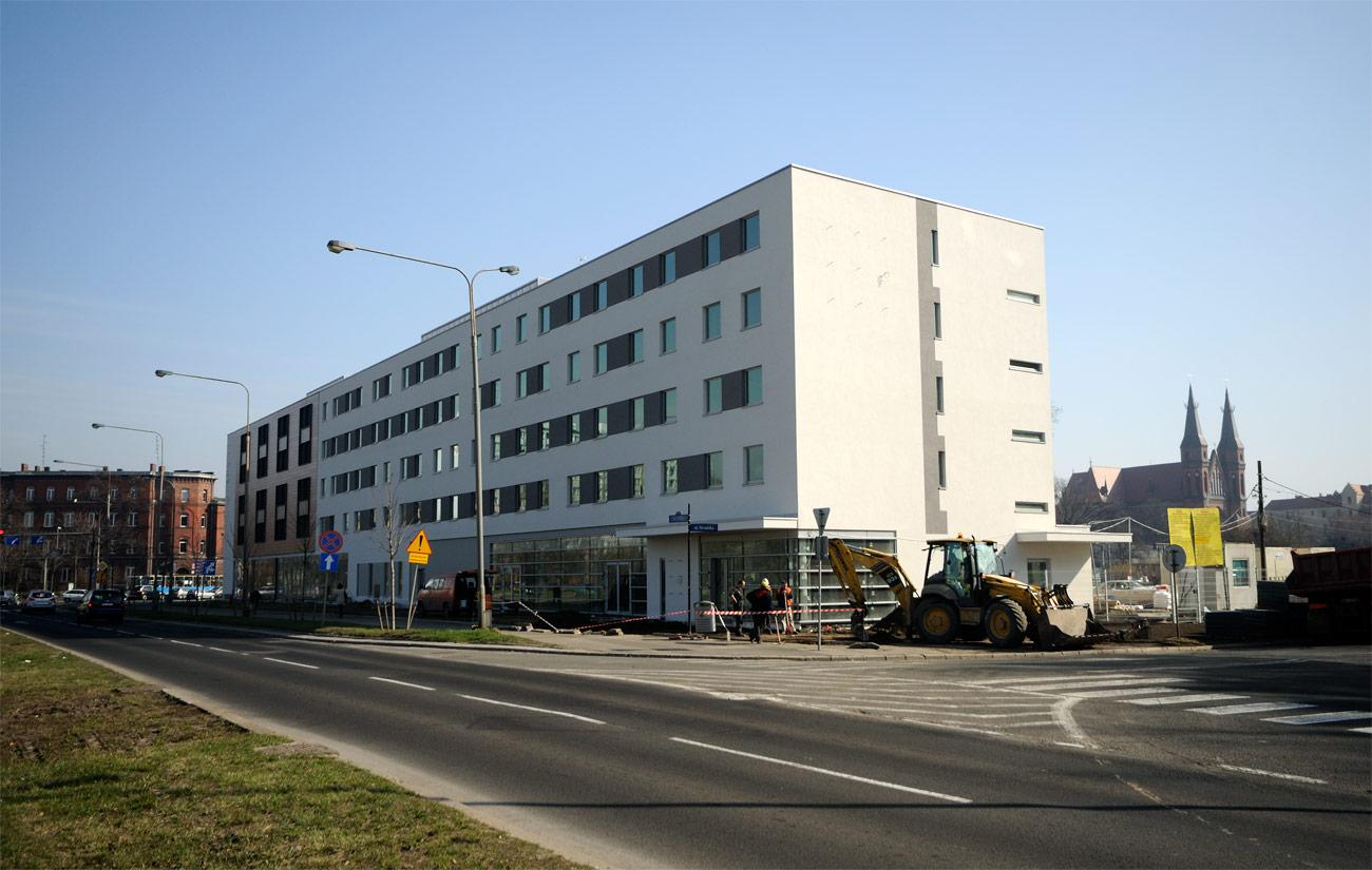 Nowy hotel widziany z ulicy Ślężnej.